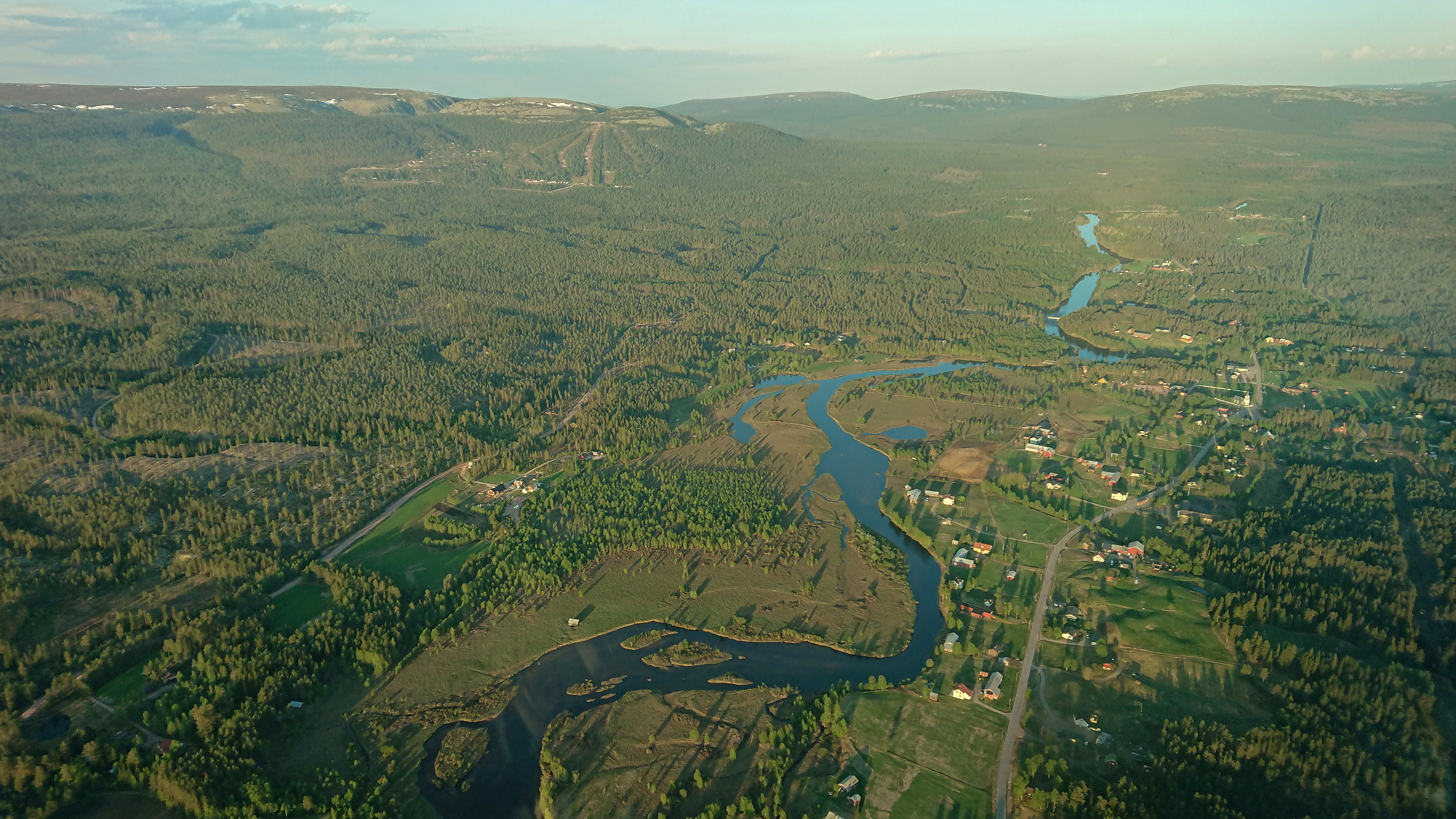 Ljørdalen, flyfoto fra nord mot sørøst. Bak t.v: Fulufjellet nasjonalpark. Bak t.h: Faksefjell.